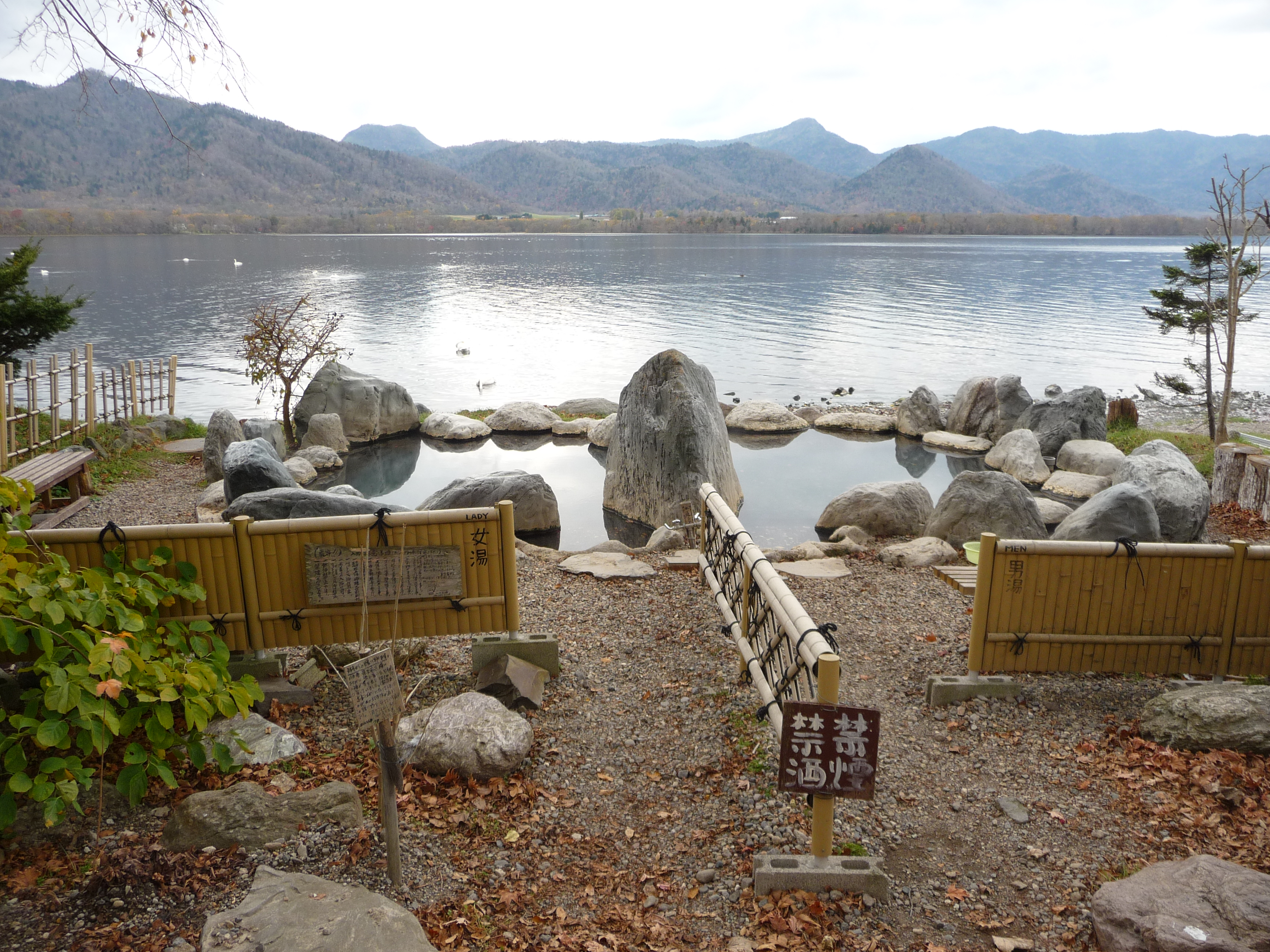 北海道弟子屈町にある、コタン温泉の露天風呂。